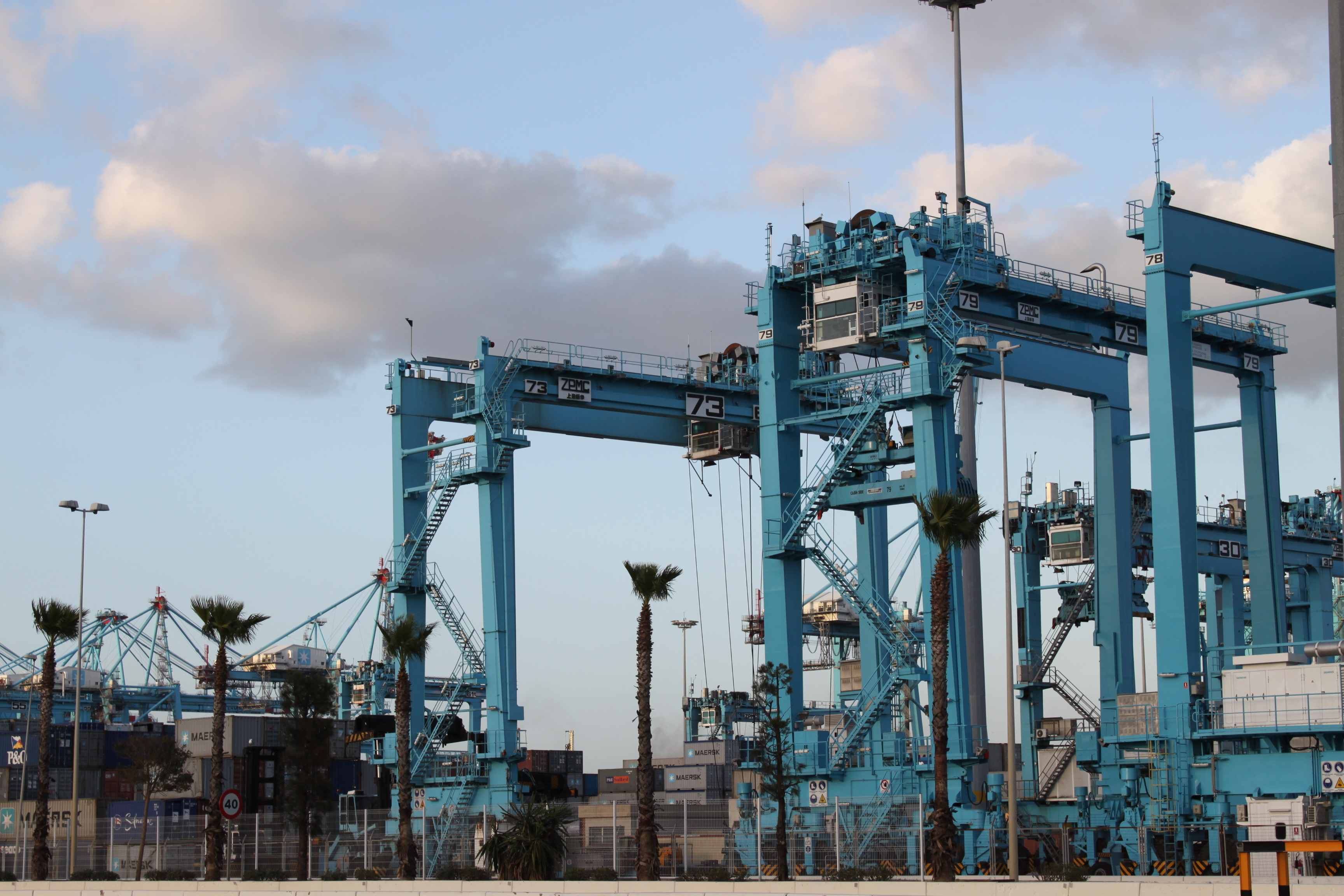 Grúas y contenedores en el Puerto de Algeciras, Andalucía, España